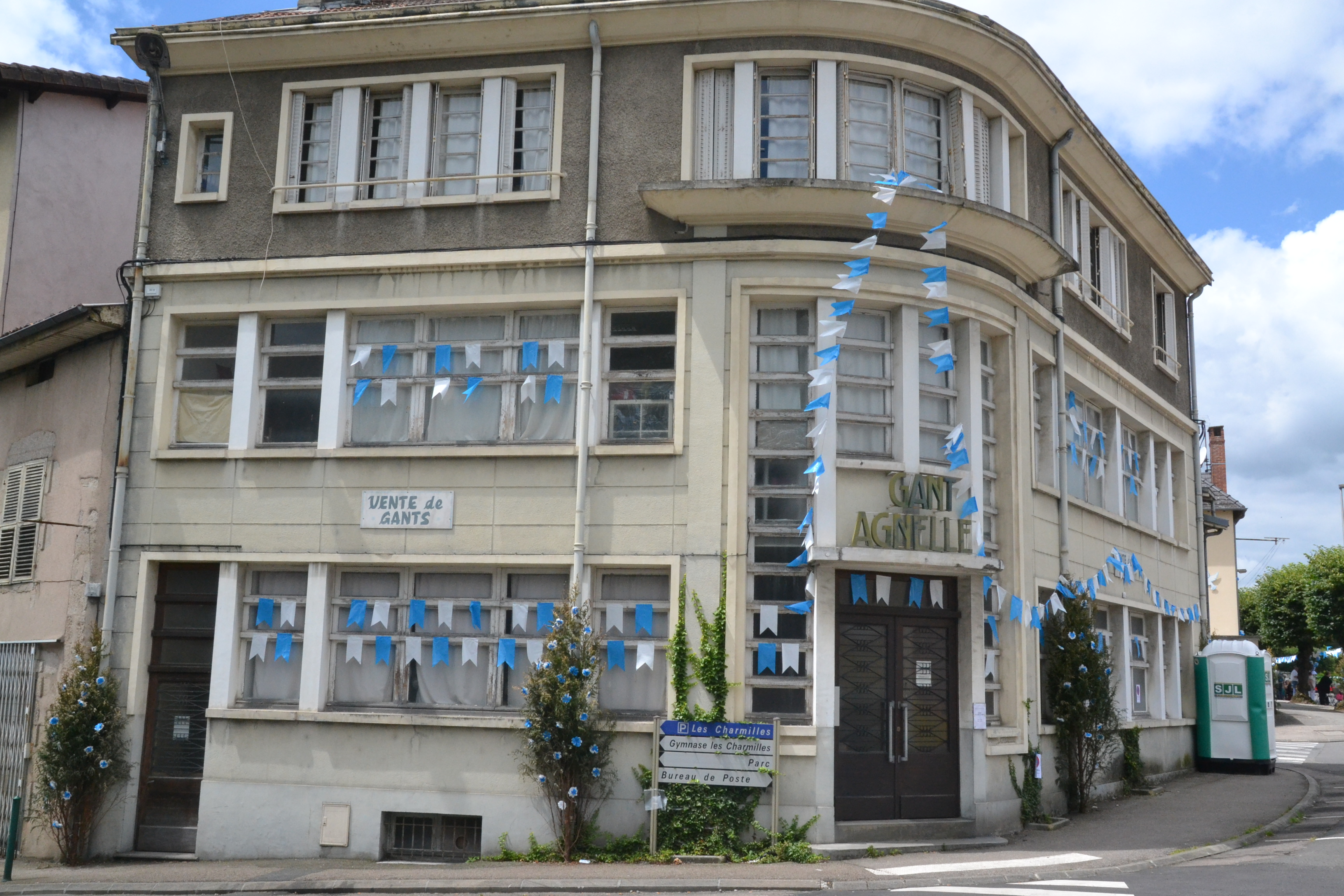 Siège de la ganterie Agnelle (Saint-Junien, Haute-Vienne, France). Décoration à l'occasion des Ostensions 2016.